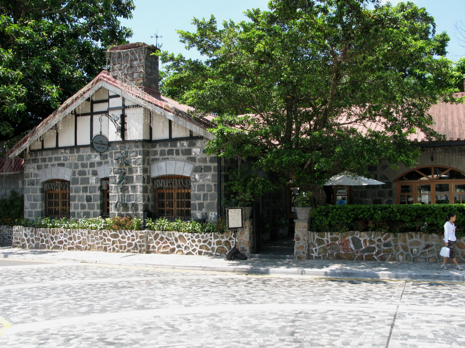 舊山頂餐廳 HK Peak Cafe